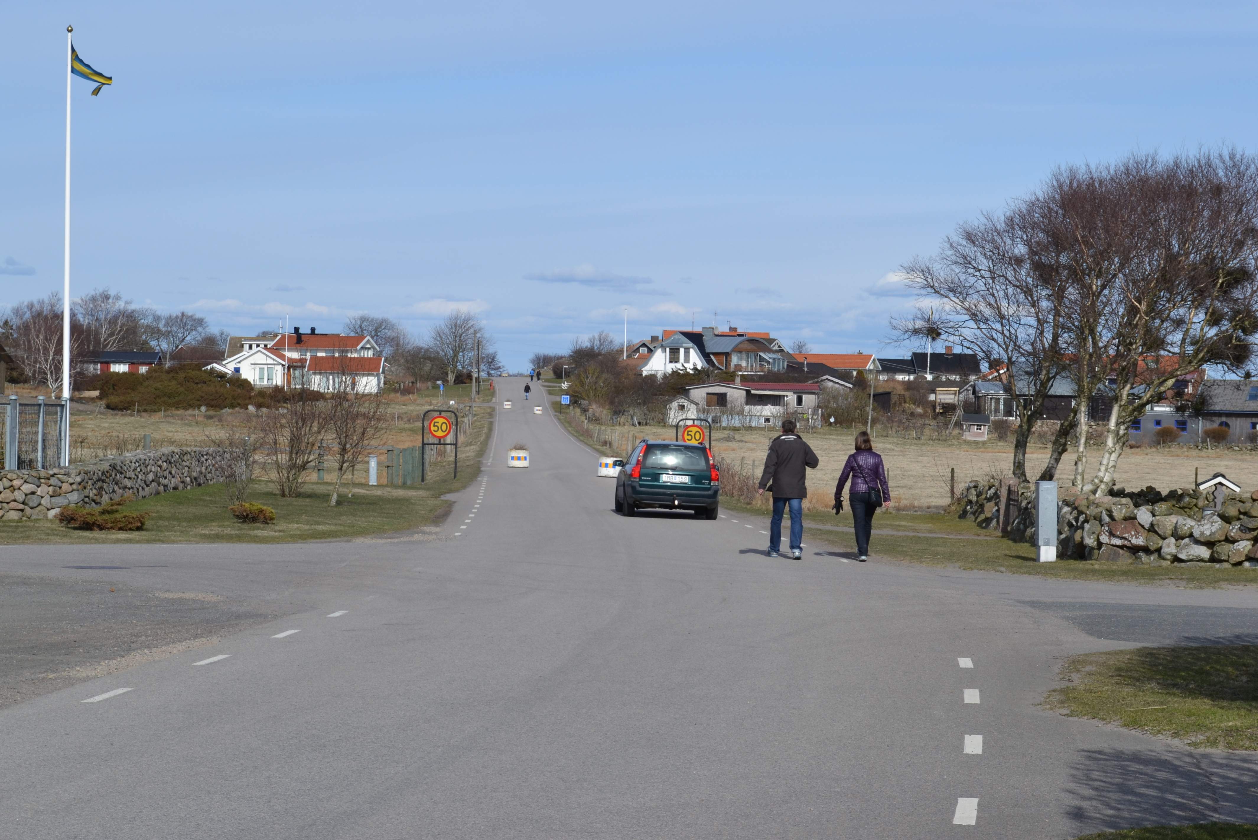 Södra Näs, Varbergs kommun.